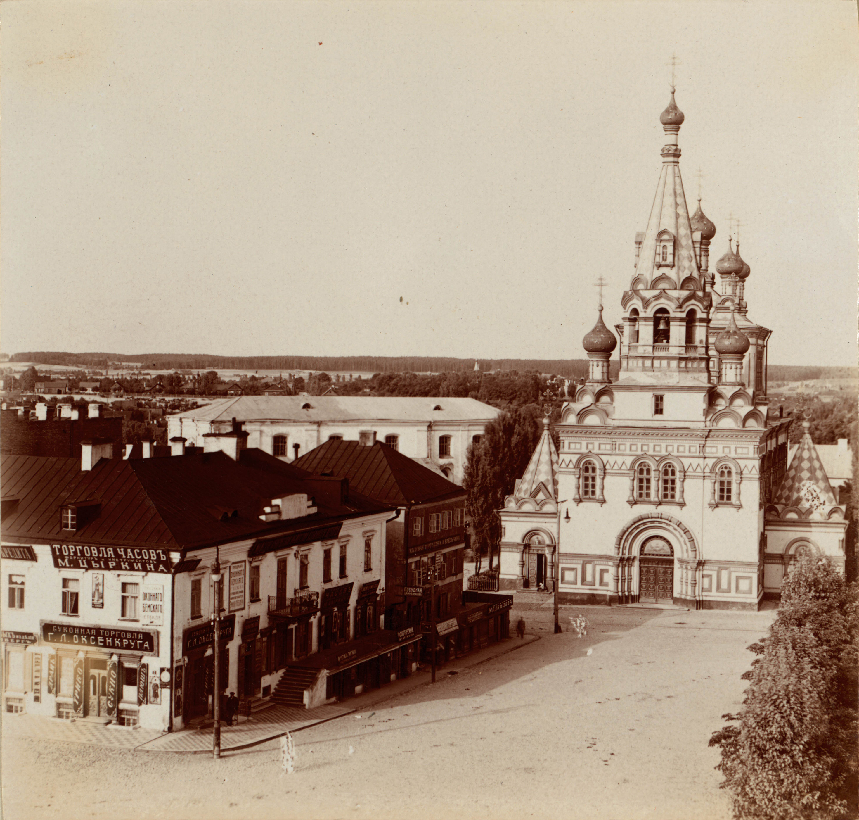 Беларуская (тарашкевіца): Менск (Miensk), Высокі Рынак (Vysoki Rynak). Царква Сьвятога Духа і манастыр базылянаў па другой маскоўскай перабудове